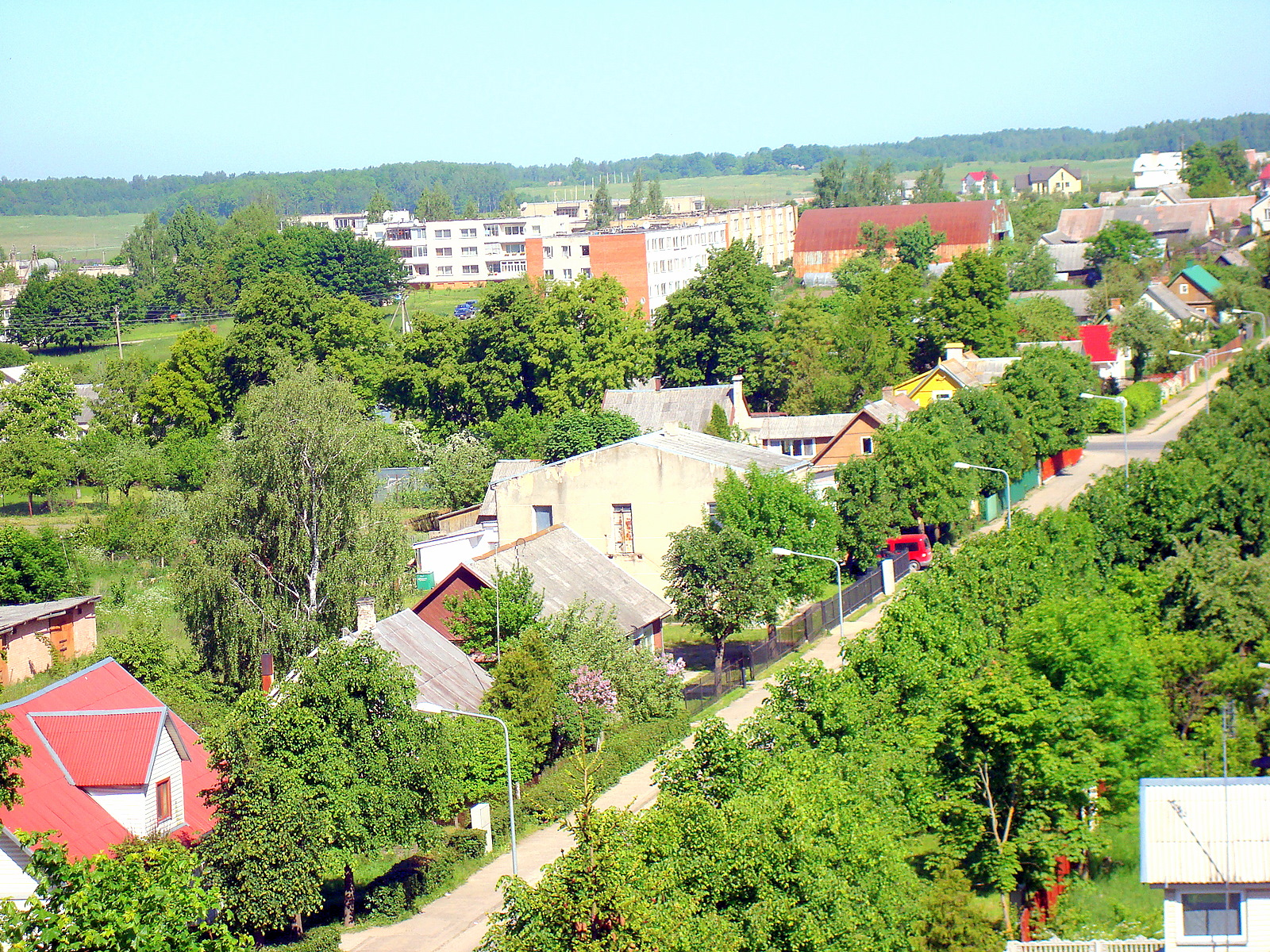 Вид с колокольни костёла